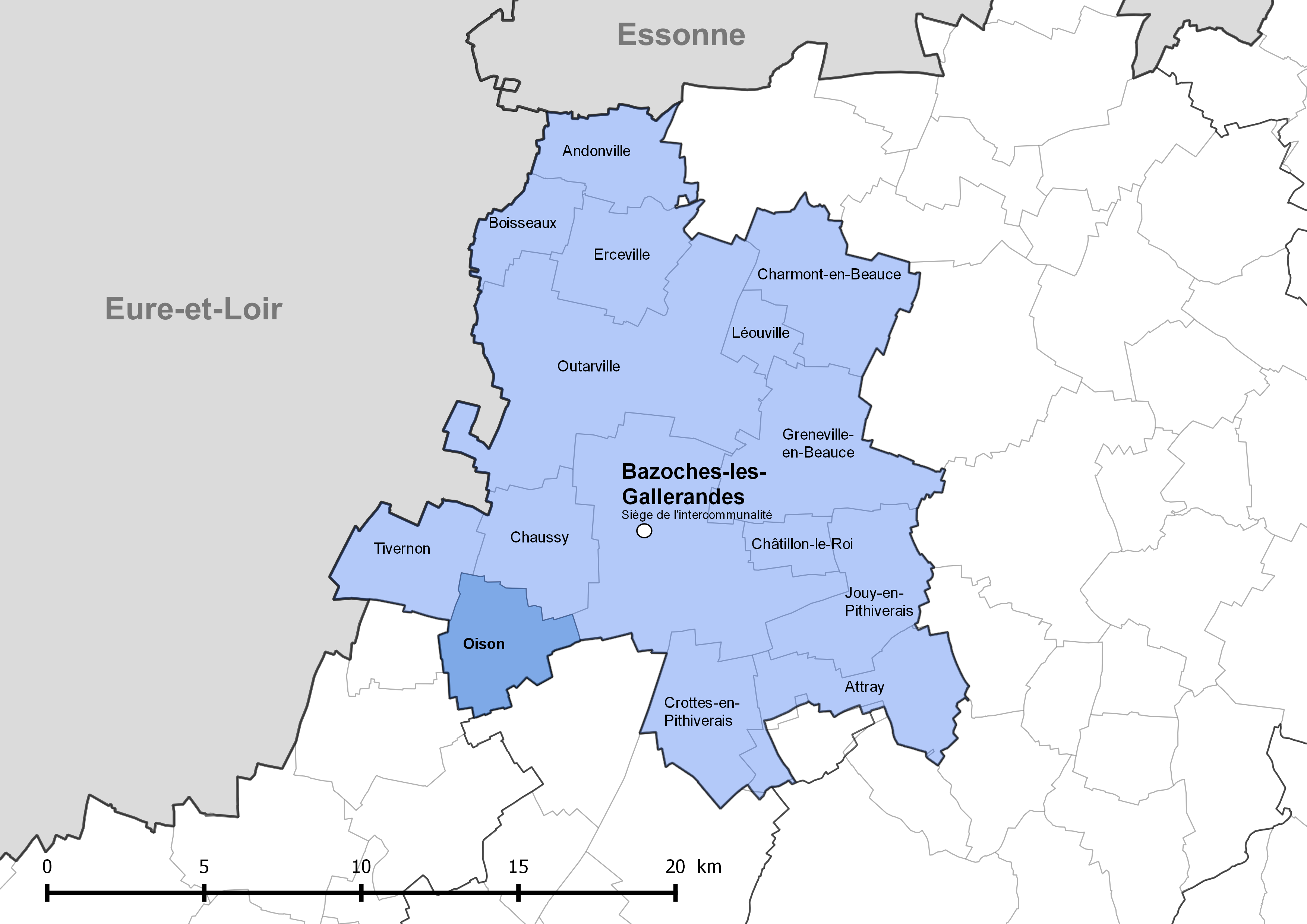 Périmètre de la communauté de communes de la Plaine du Nord Loiret - Situation de la commune de Oison (Loiret).